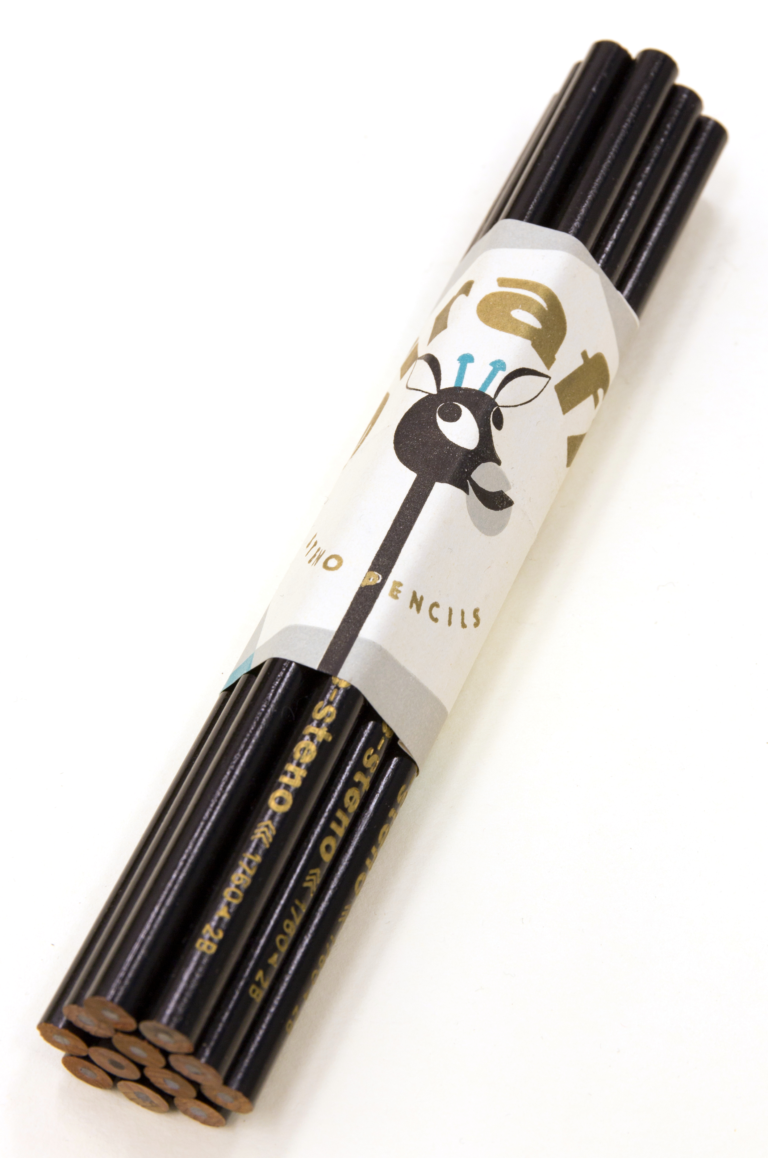 Konvolut Bleistifte (12) Giraffe, Steno Pencils Indetifikations-Nr.: N (9 A 119) 419/1995 Datierung: 1960-1989 Herkunft: Berlin (Ost), DDR Herstellungsort: Tschechoslowakei (jetzt Tschechien) Hersteller: Bohemia Works Länge: 18 cmDurchmesser: 3 cm Ausgabe: Holz, Druck Zustand: neu Beschreibung:Ein Bund mit Badeorte und zwölft Bleistiften. Die farbig bedruckte Badeorte trägt eine stilisierten Giraffenkopf mit Hals und der Aufschrift: - Giraffe.Steno Pencils.Giraffe (-steno) Nr. 1760 - 2 BAus dem Lagerbestand des ehem. Bauministeriums der DDR im Berlin-Mitte.